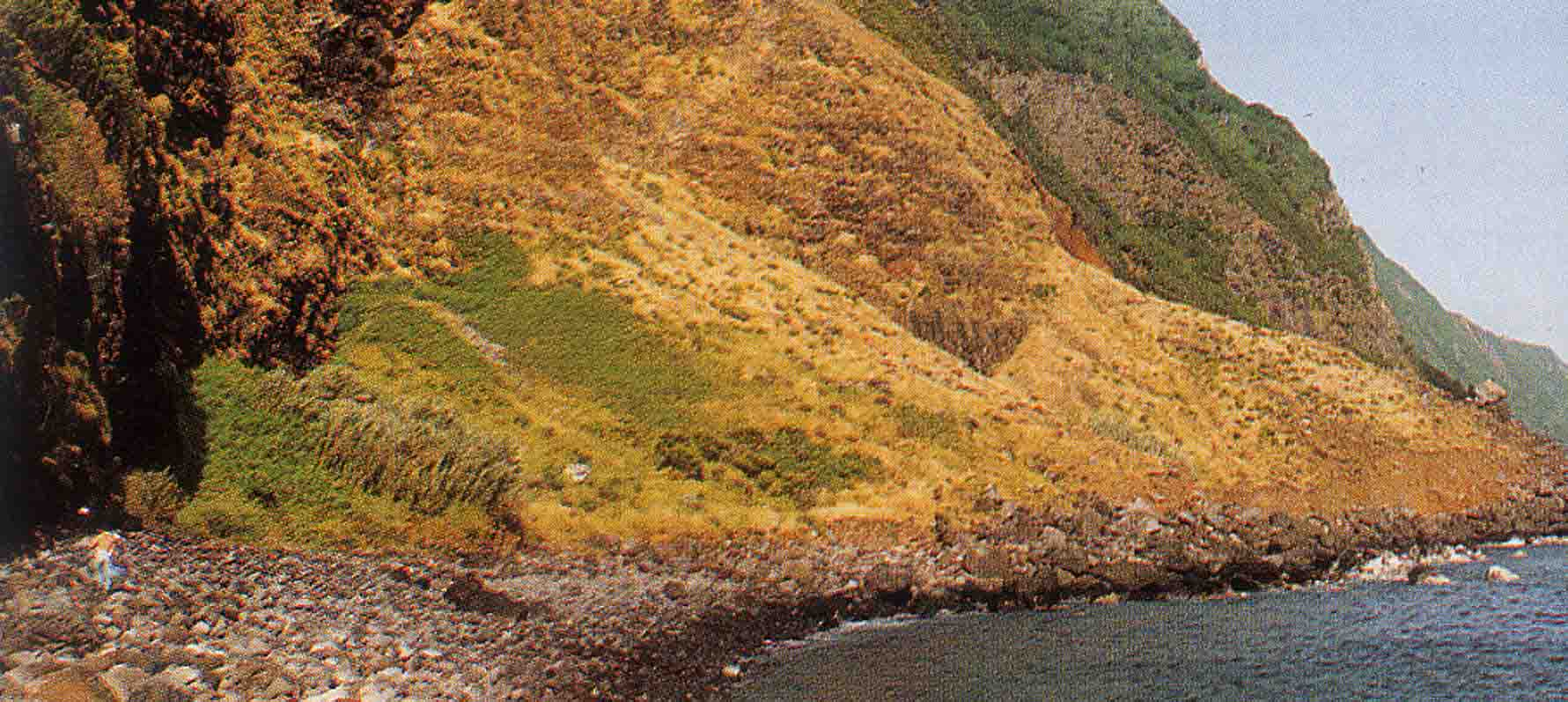 Faja de Entre Poios, ilha de São Jorge, Açores, Portugal.